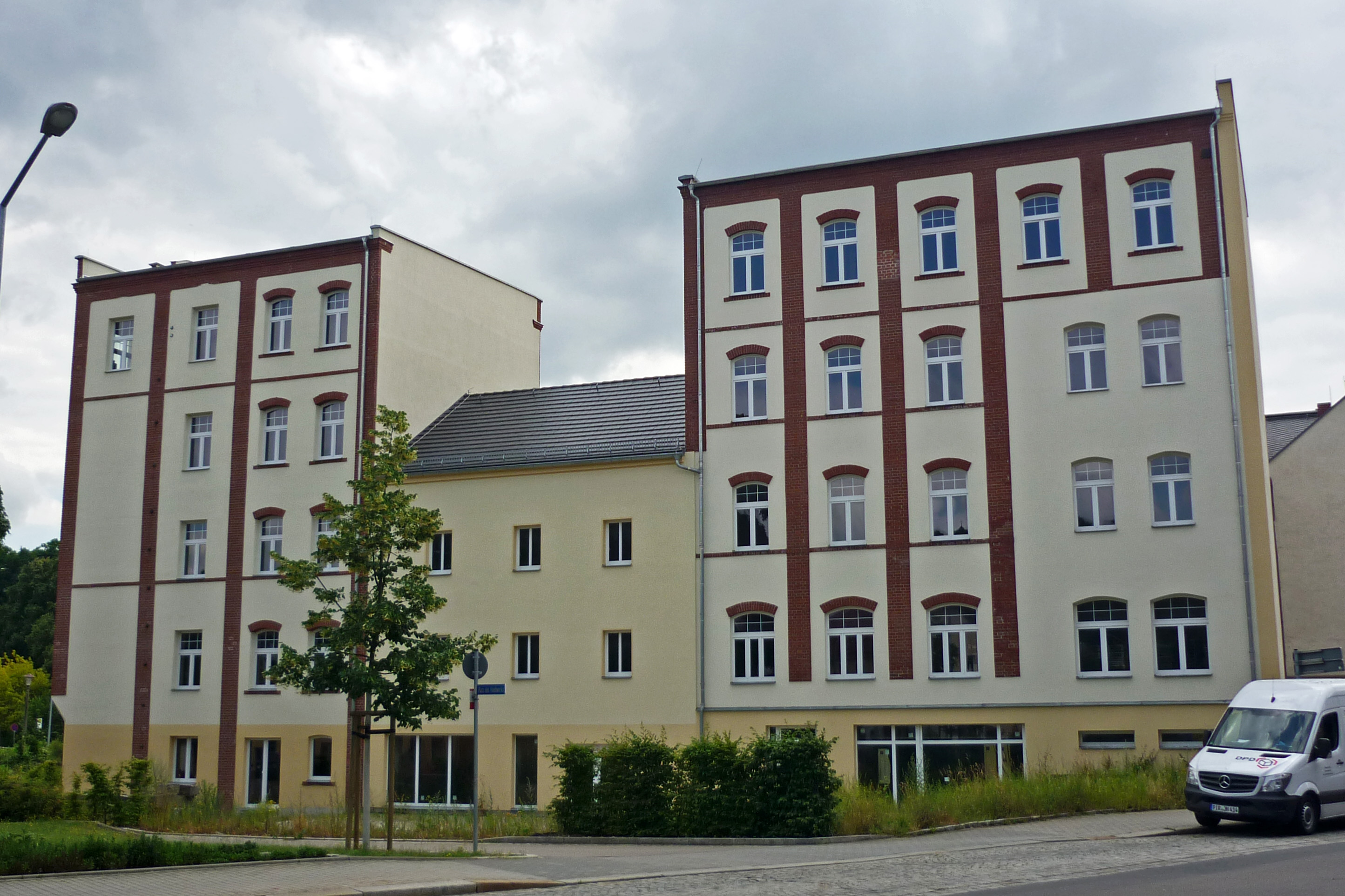 Ehem. Hofe-Mühle in Potschappel (Freital)